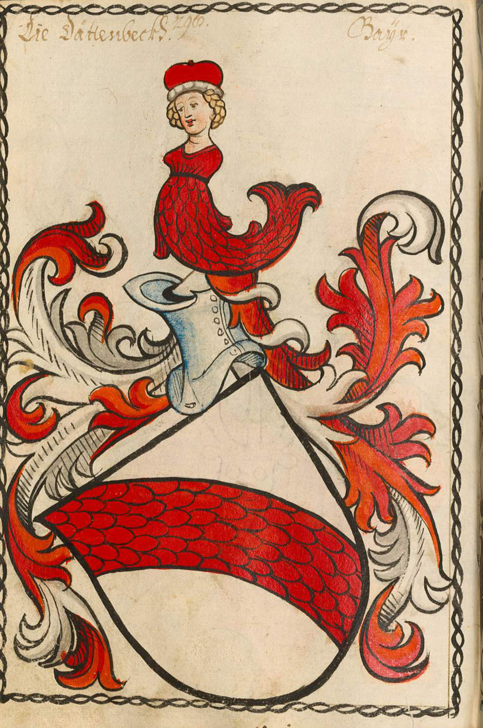 Scheibler'sches Wappenbuch , älterer Teil; Seite 298 die Dättenbeckh Bayern